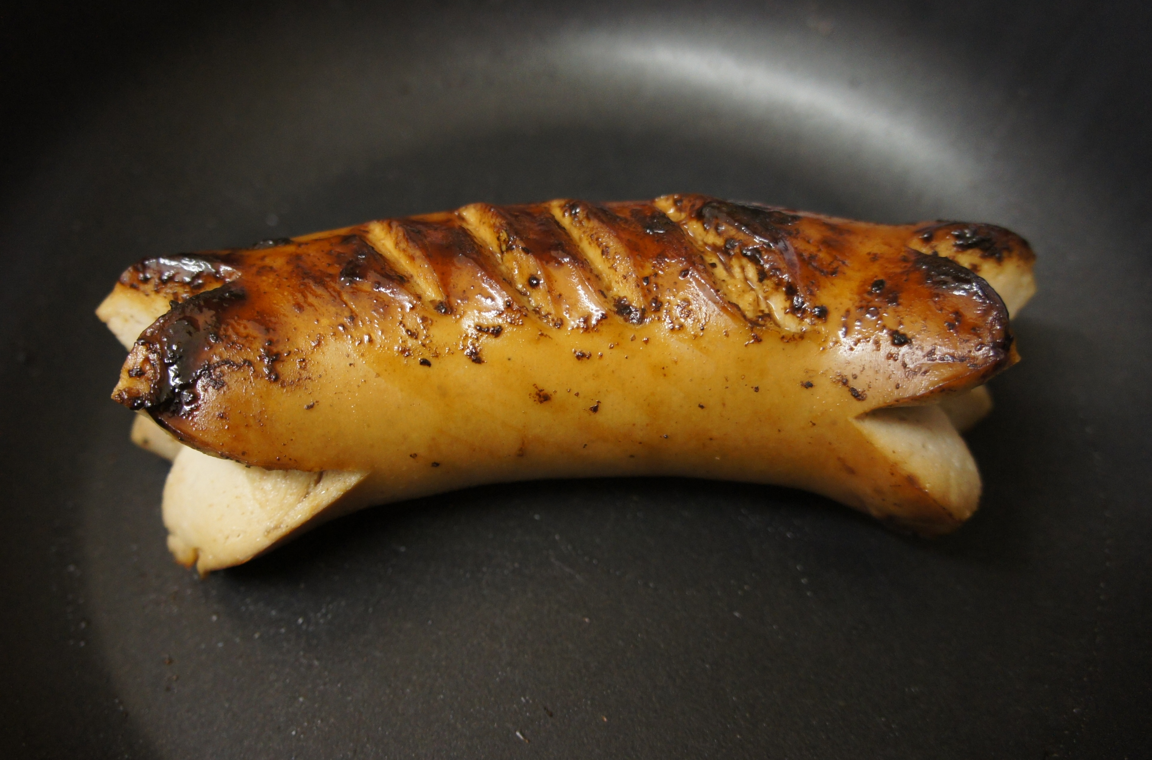 Ein gebratener Cervelat in einer Bratpfanne.